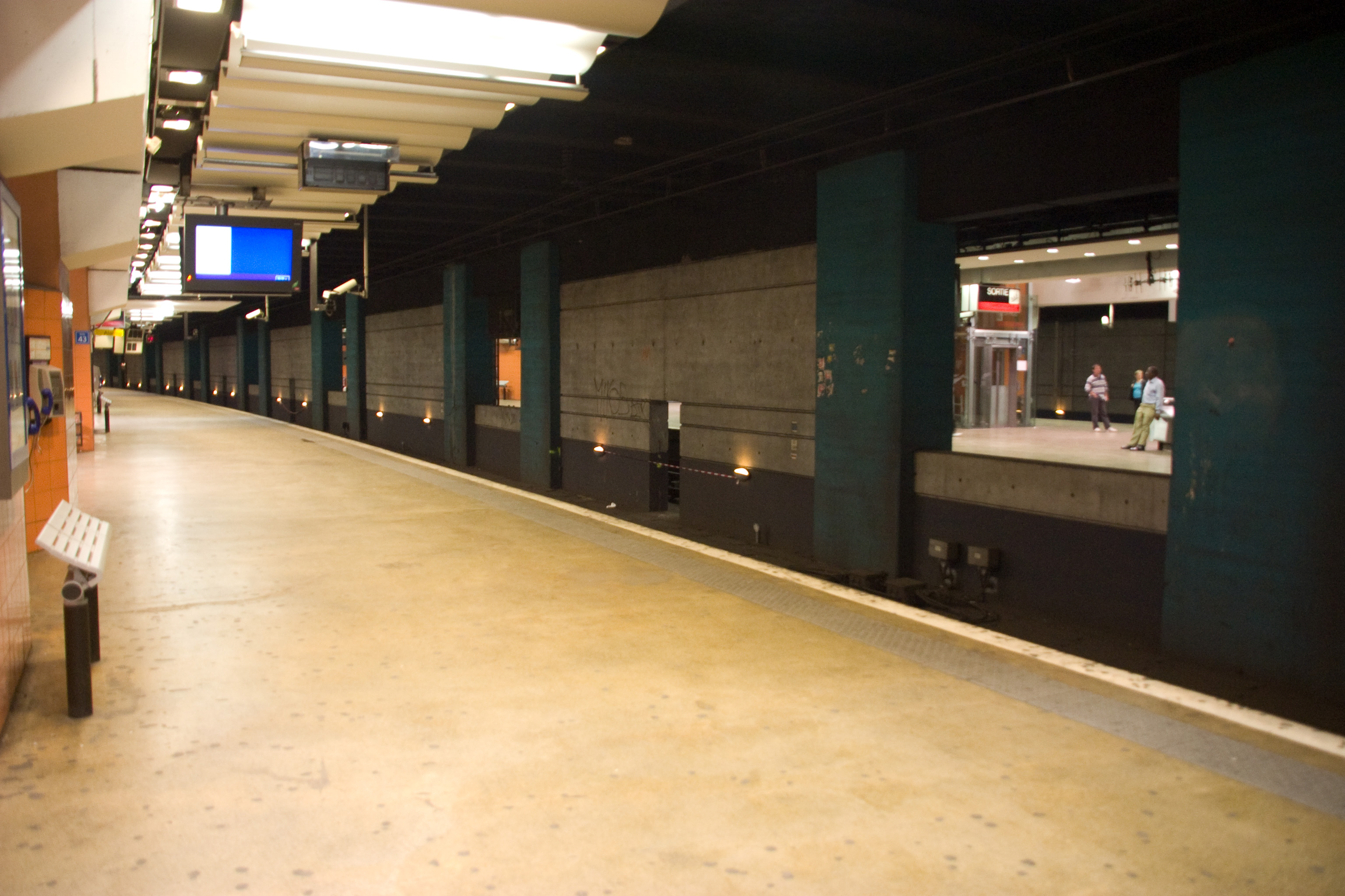 Gare du Nord, Paris, France